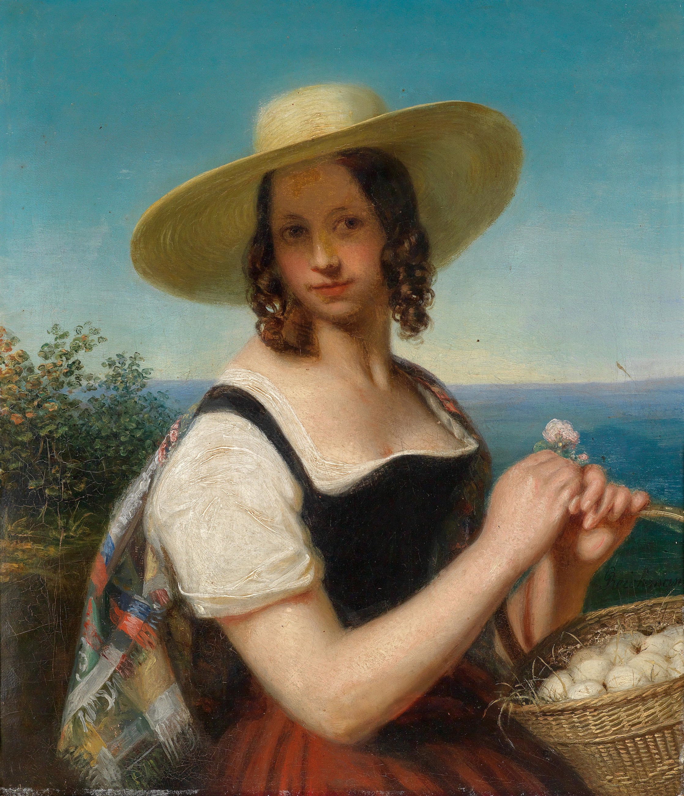 Porträt von Augusta Karoline von Cambridge, Großherzogin von Mecklenburg-Strelitz